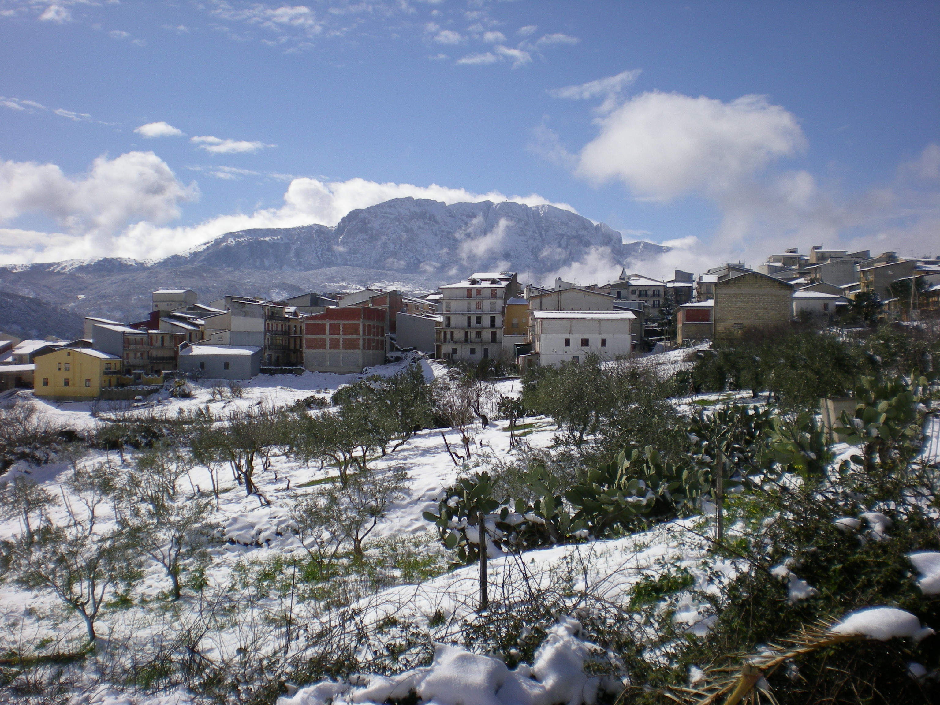 Panorama innevato di Godrano con la Rocca Busambra sullo sfondo